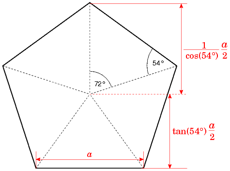 Techn. Zeichnung eines Fünfecks Zeichner: Lars Rohwedder (RokerHRO) Copyright: Public Domain (gemeinfrei) Kreiert mit XFig.